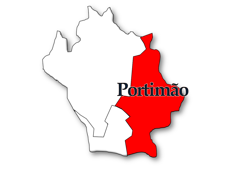 Censos 1864/2011